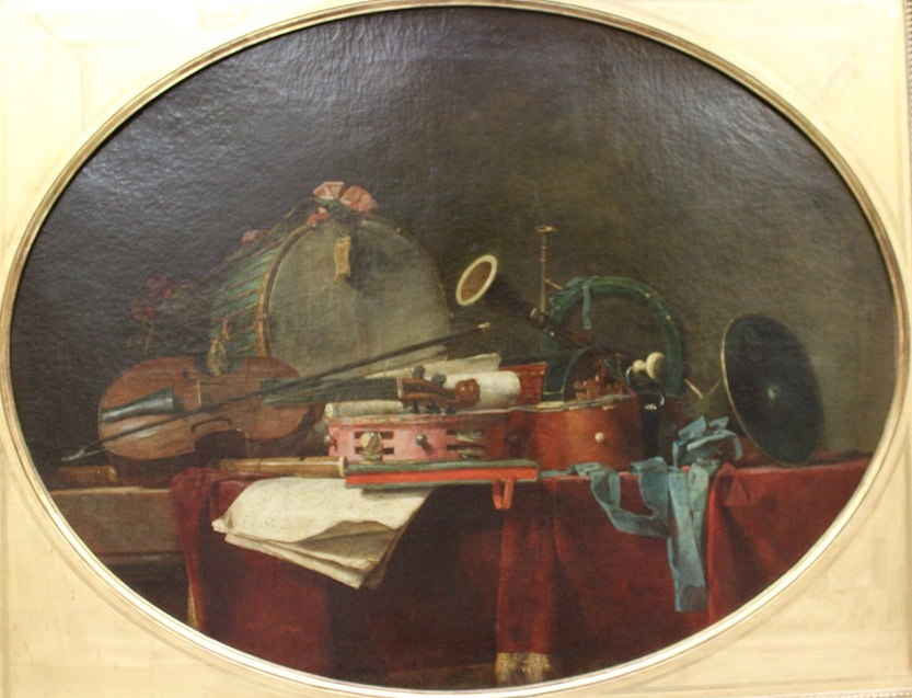 Pendant of File:Chardin attributs musique militaire.jpg